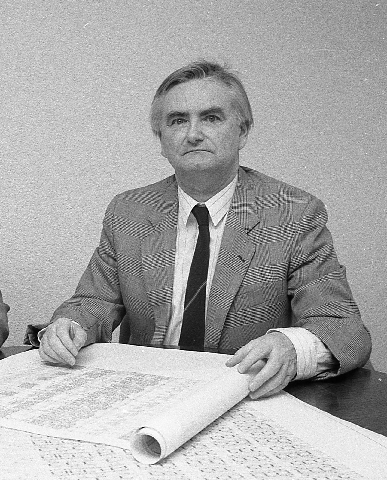 Otto Müller (Computer-Pionier) sitzt an einem Tisch und schaut in die Kamera. Vor ihm liegen technische Pläne. Das Foto hat Hella Wolff-Seybold im Januar 1989 aufgenommen.